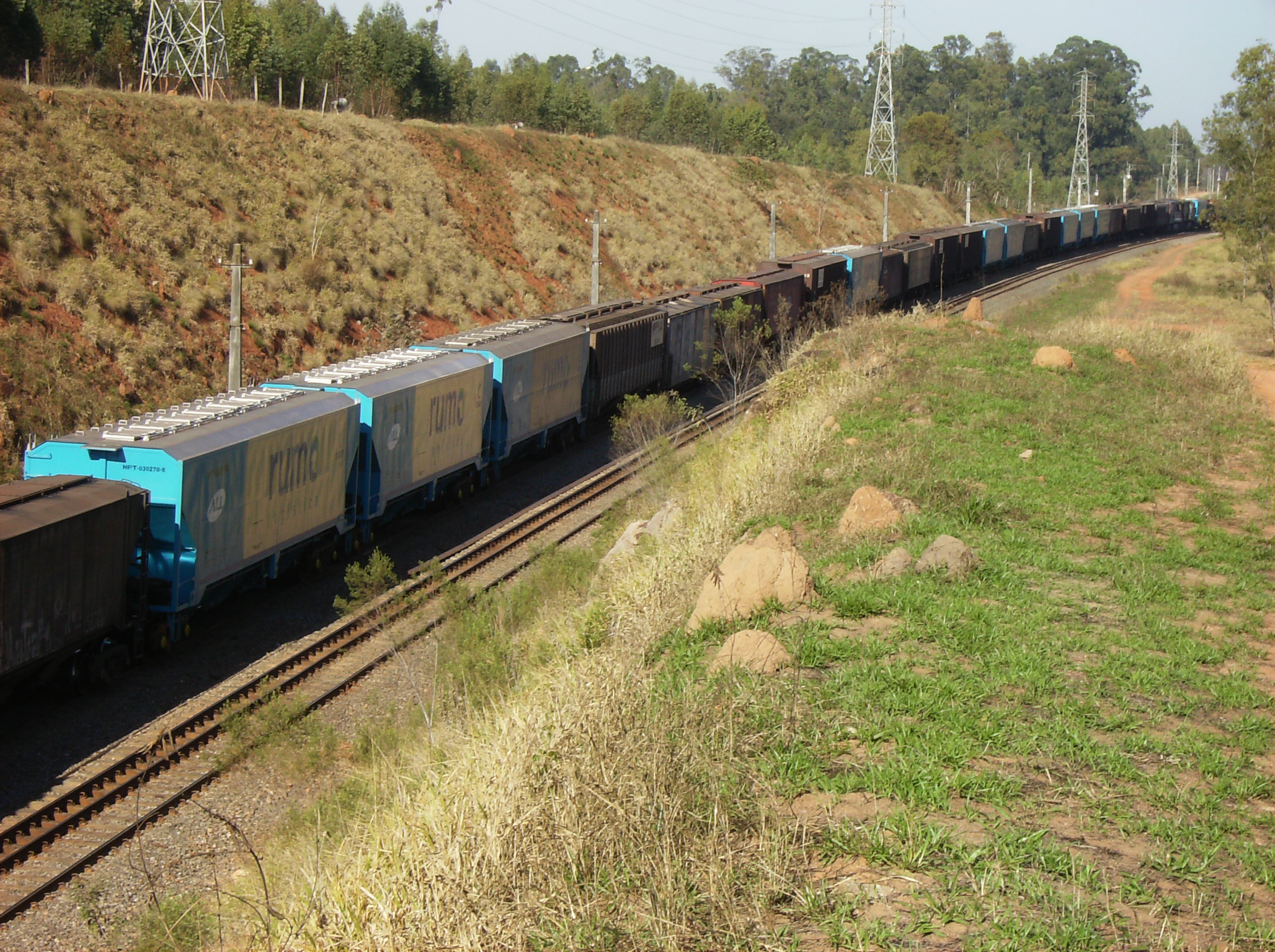 Comboio parado no pátio da estação ferroviária de Salto. Variante Boa Vista-Guaianã km 211.